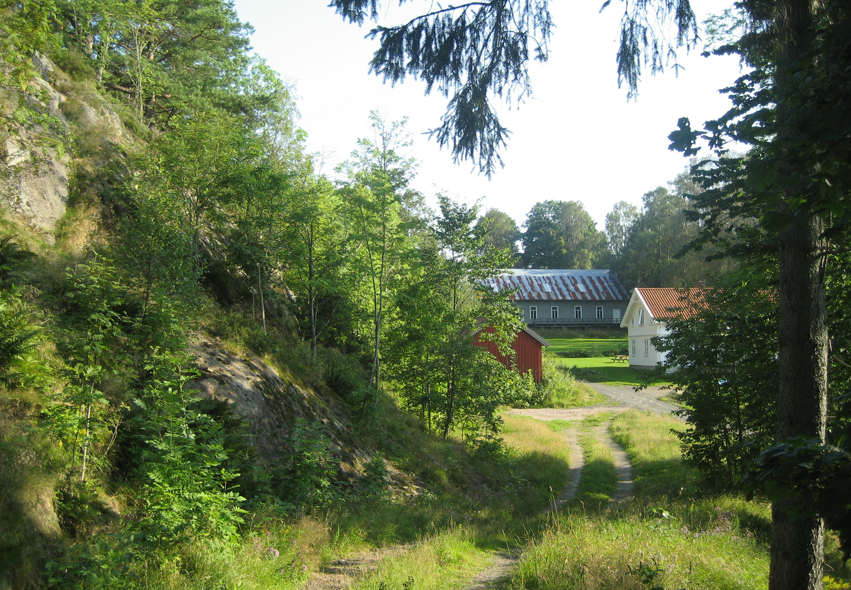 Gamle militære bygninger på Håøya ved Nøtterøy i Vestfold.